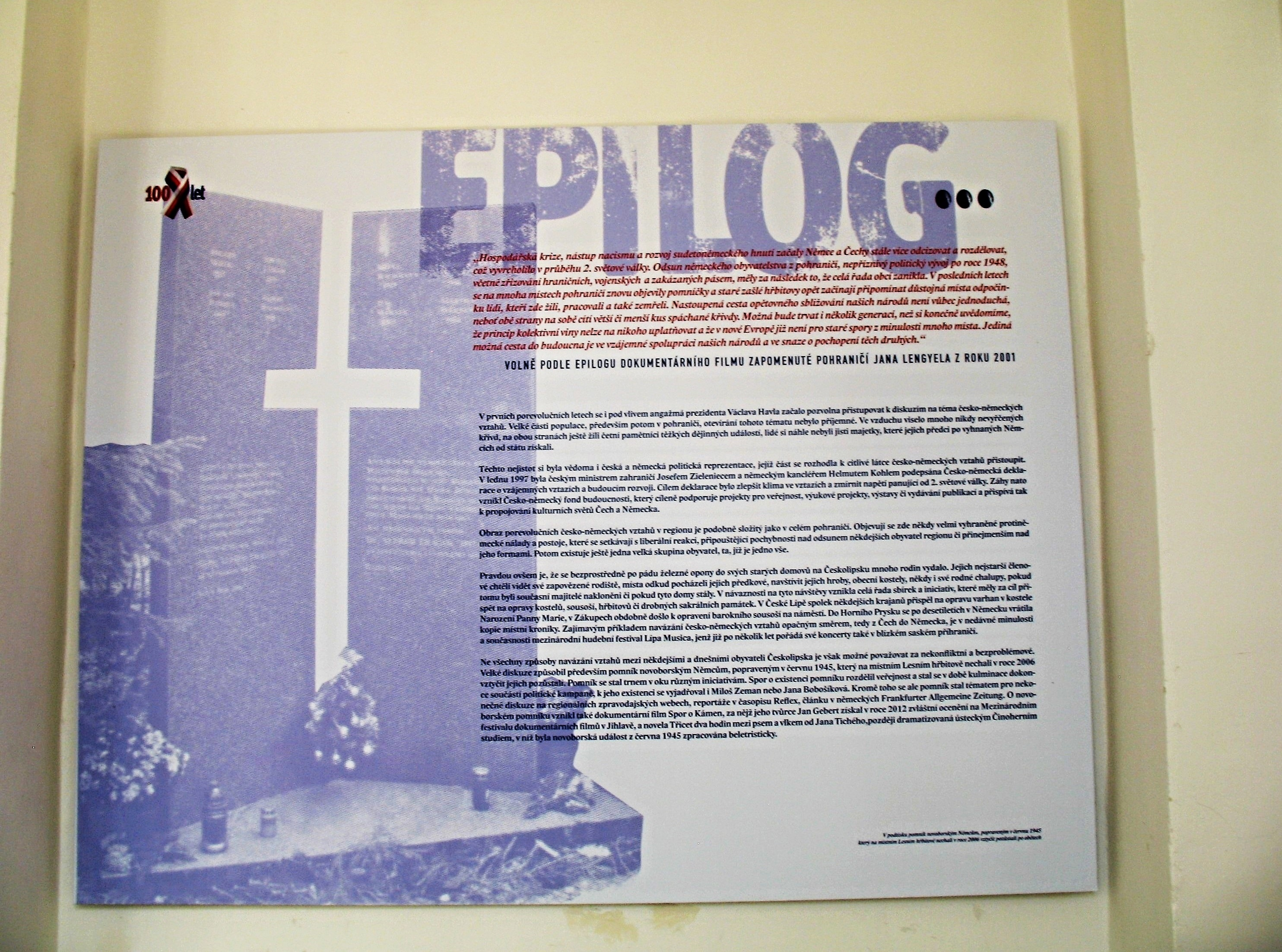 Výstava "100 let" ve Vlastivědném muzeu v České Lípě (květen - listopad 2018)